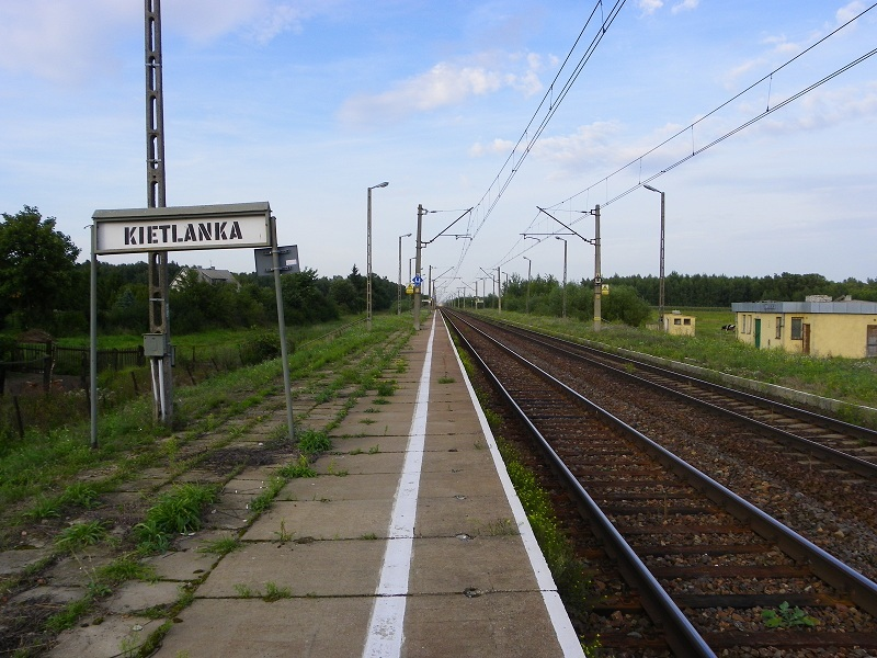 Kietlanka